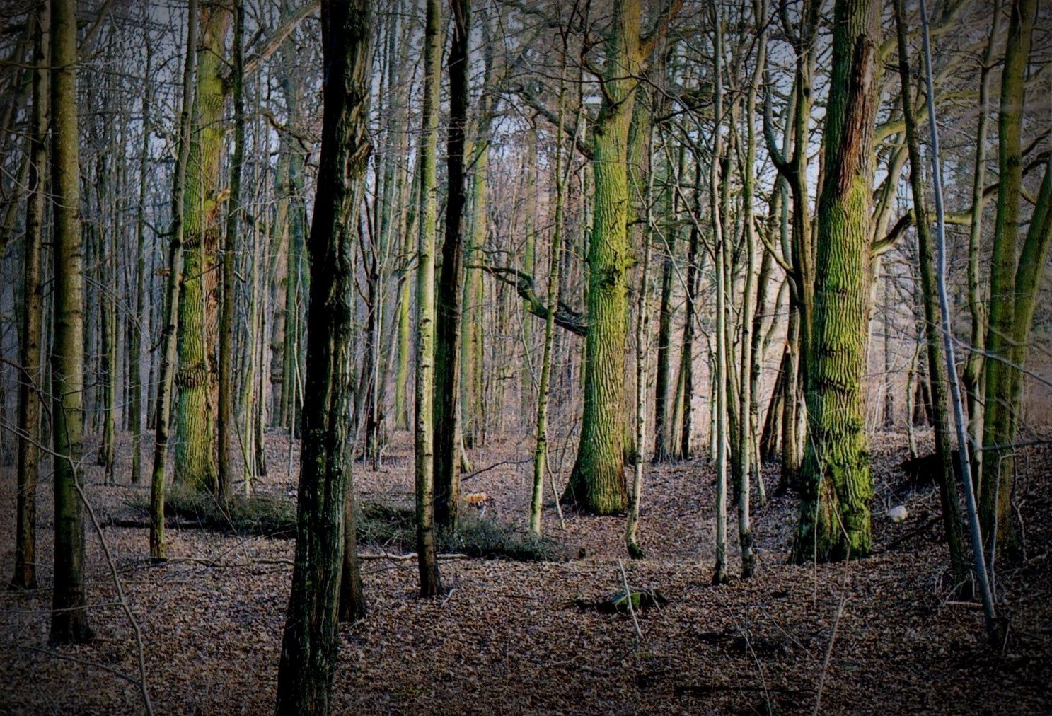 Autor: Adrian Grzegorz